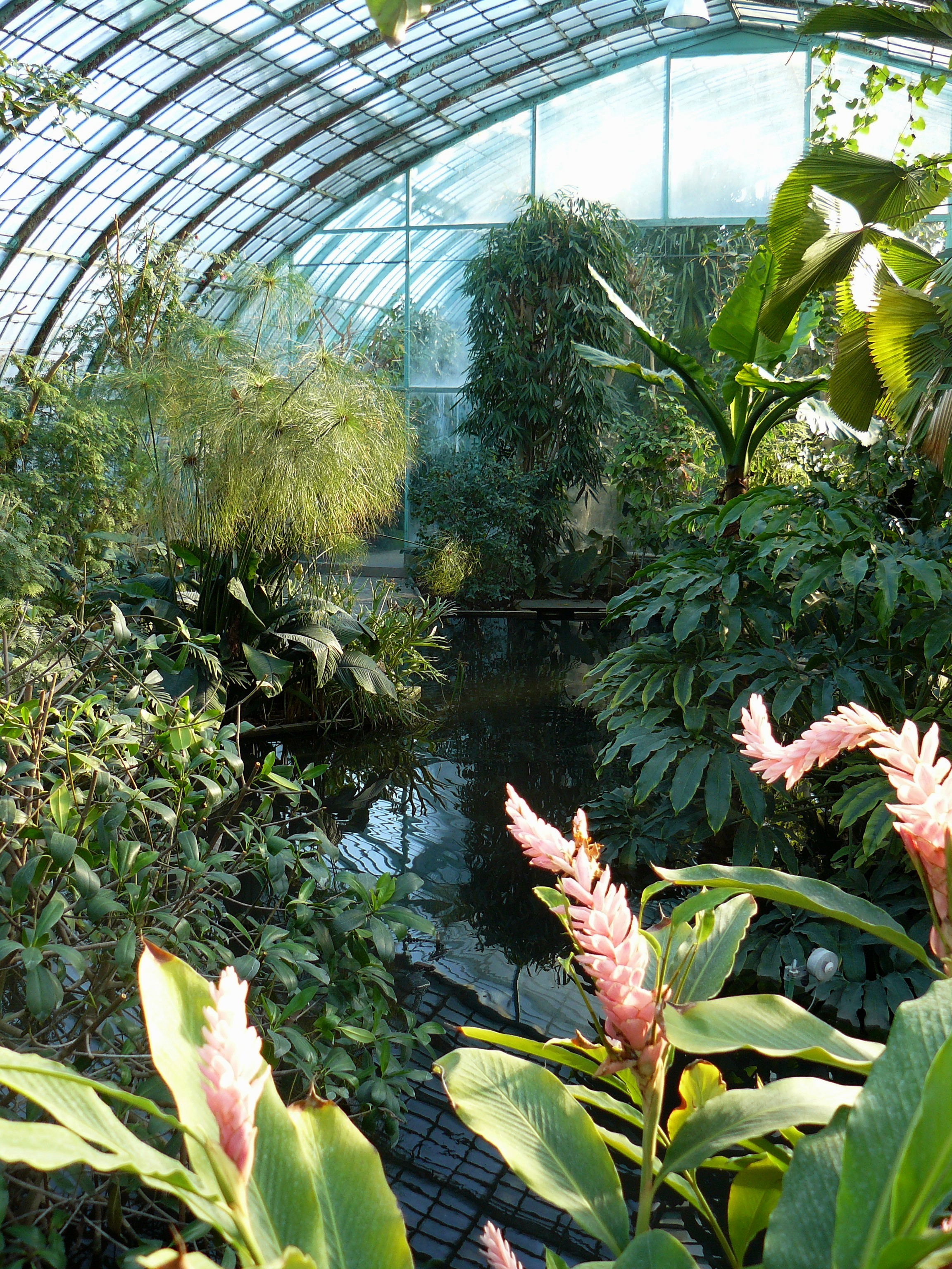 Serres d'Auteuil, Paris